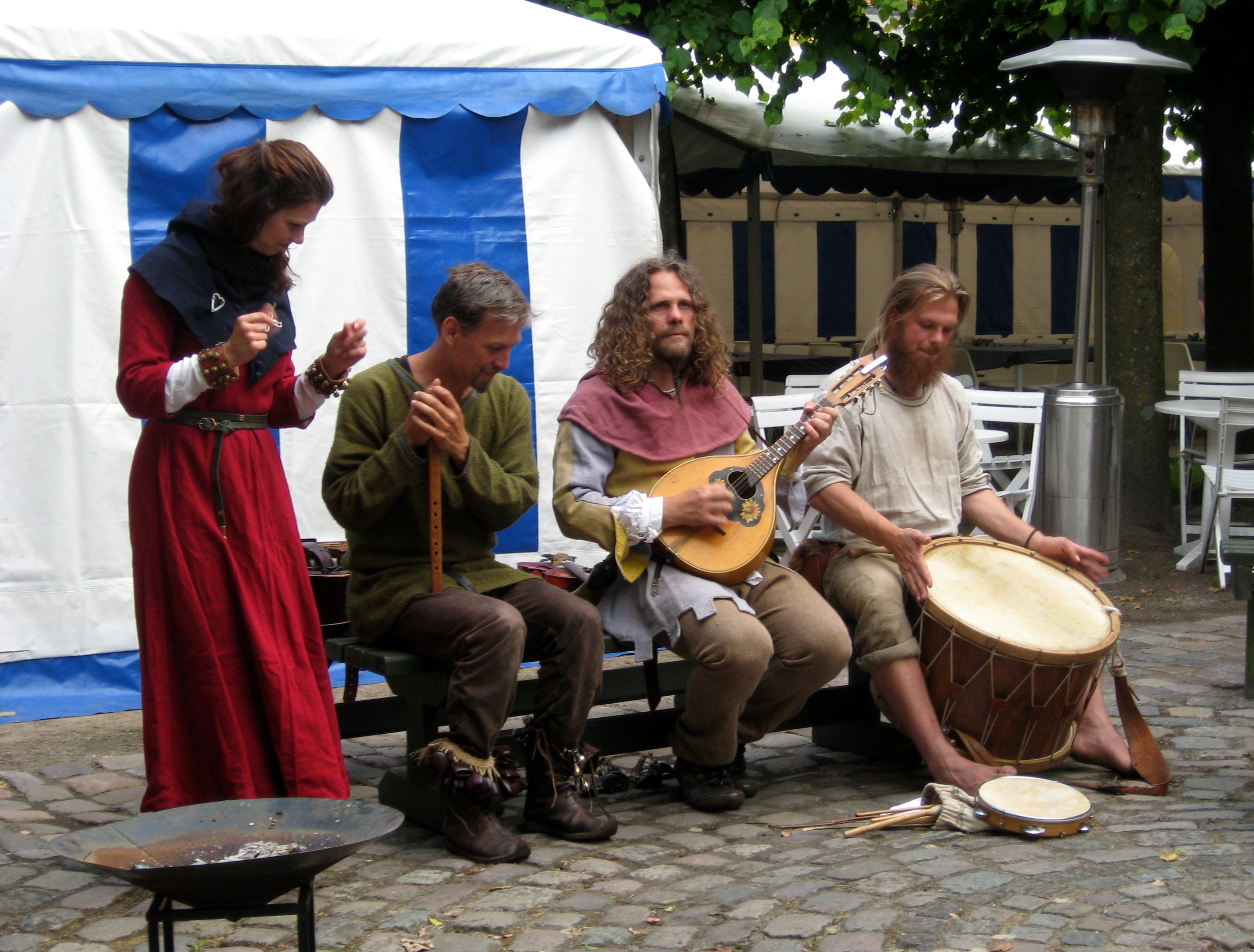 Bandet Virelai fejrer solhverv i Aalborg